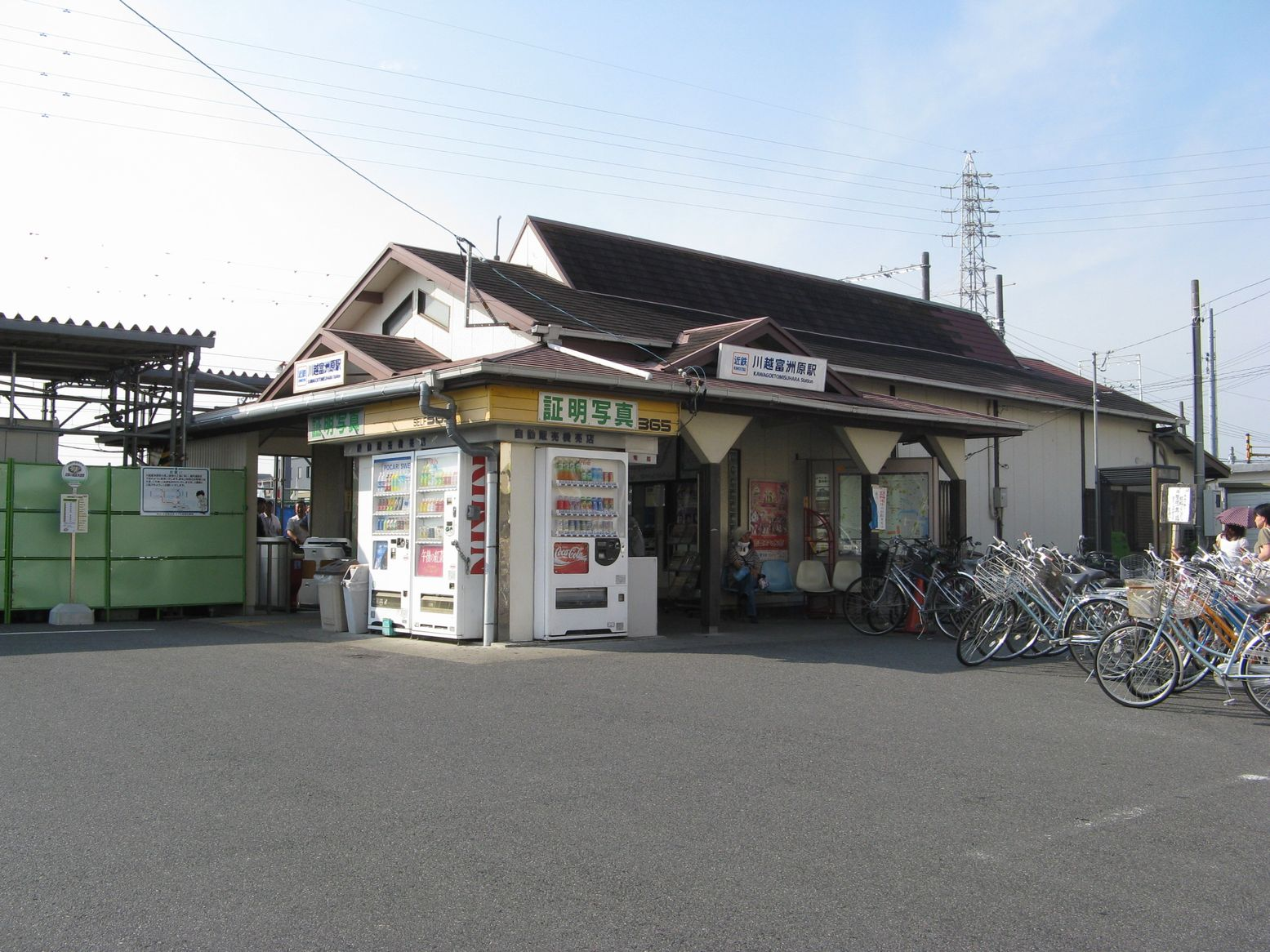 近鉄名古屋線川越富洲原駅 駅舎